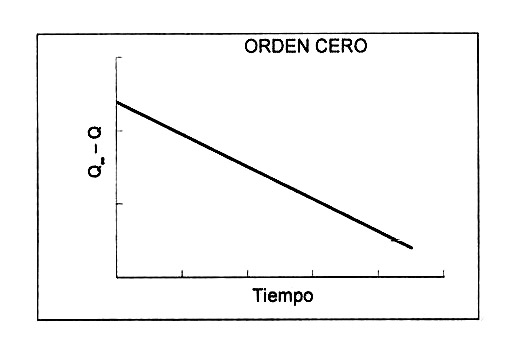 Gráfica de orden 0 de la ecuación de Noyes-Whitney